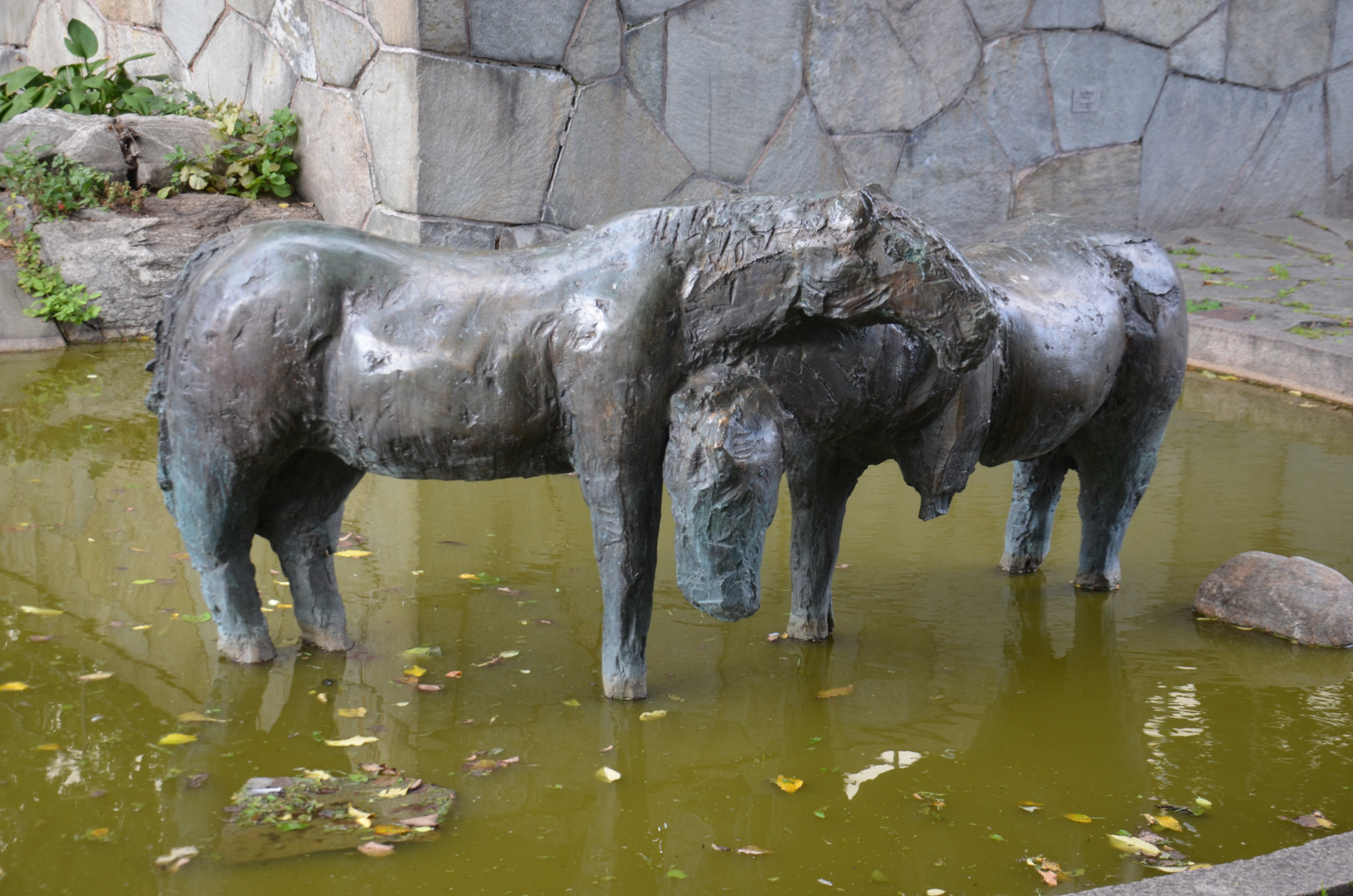 Berto Marklunds Vid källan, brons, Tjurbergsparken, Södermalm, Stockholm